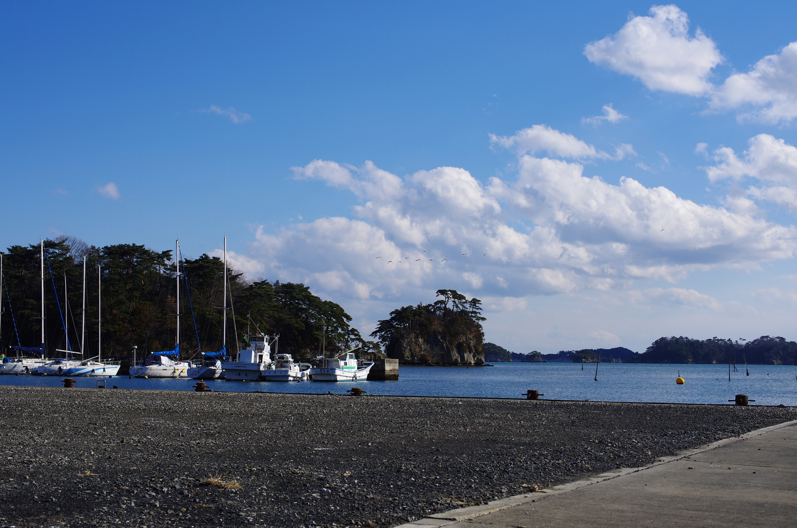 浜田港岸壁 Hamada quai